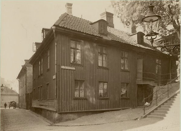 Wadmanska huset, Nedre Kvarnbergsgatan 11, Göteborg.